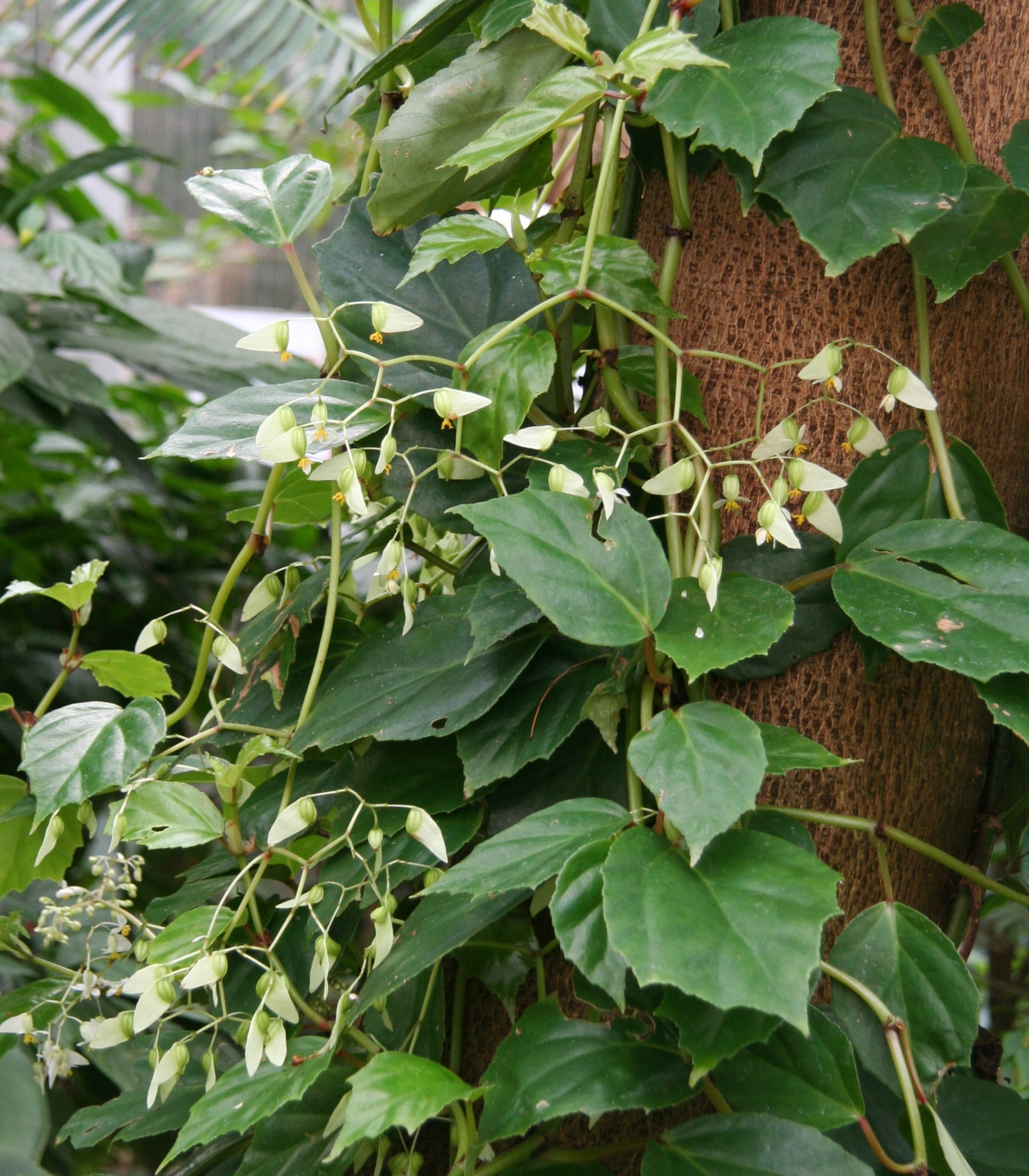 Begonia glabra im Botanischen Garten Dresden